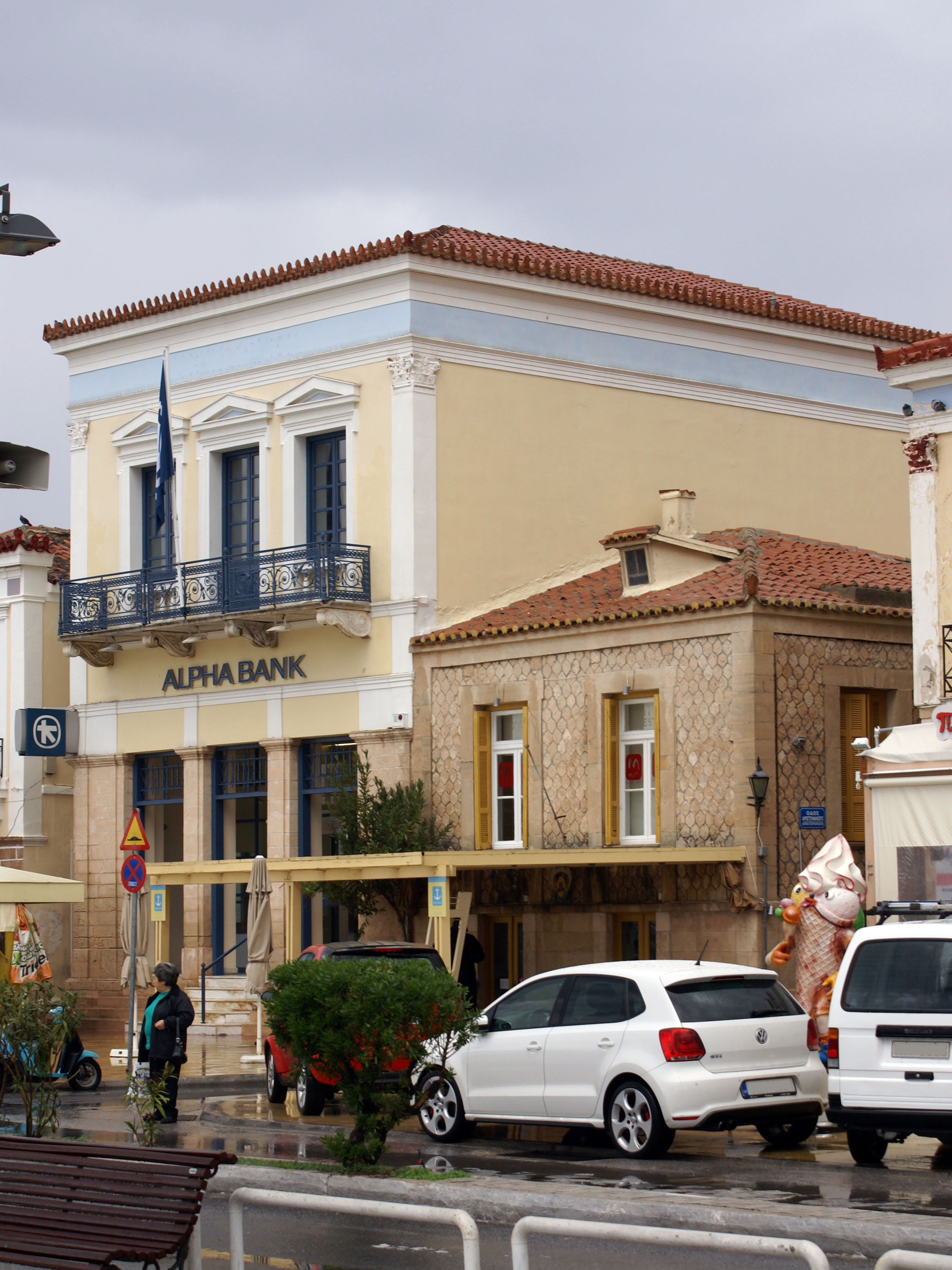 Alpha Bank in Aegina